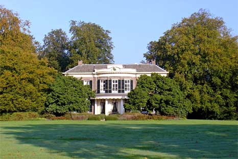 Huize "Het Enzerinck" in de omgeving van Vorden